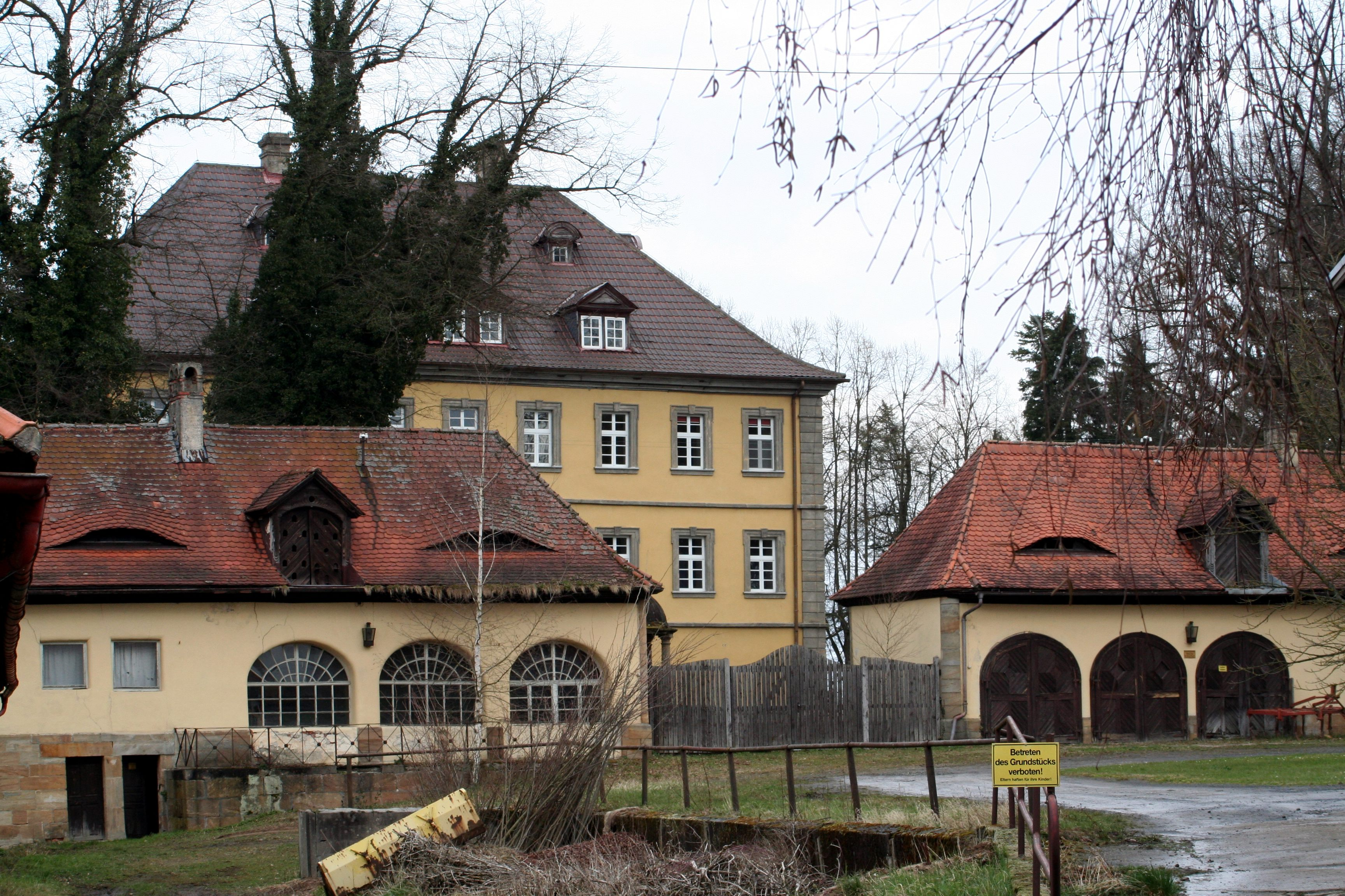 Schloss in Hafenpreppach, Teil der Gemeinde Maroldsweisach im Landkreis Haßberge in Bayern